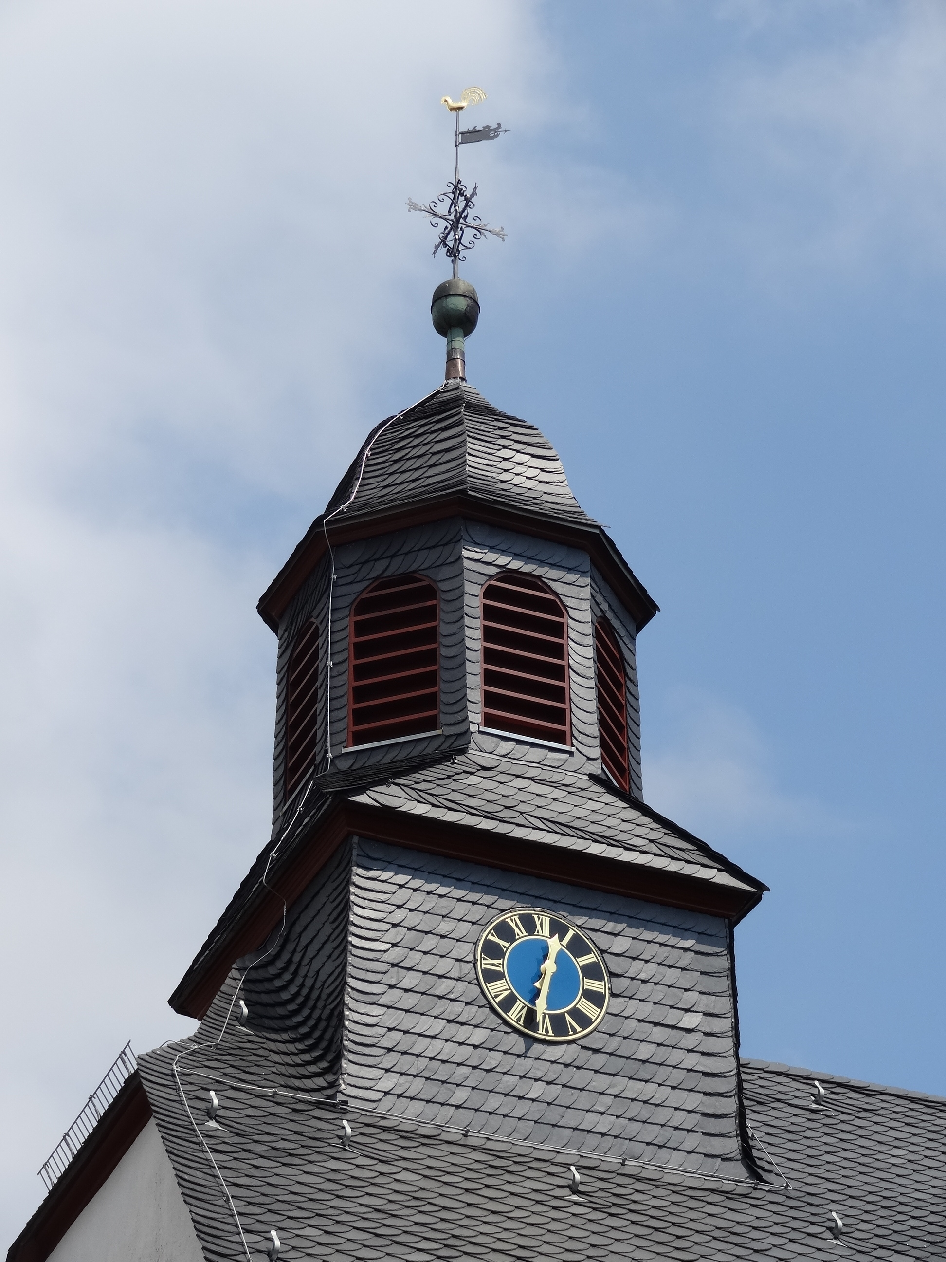 Evangelische Kirche (Maibach, Butzbach)